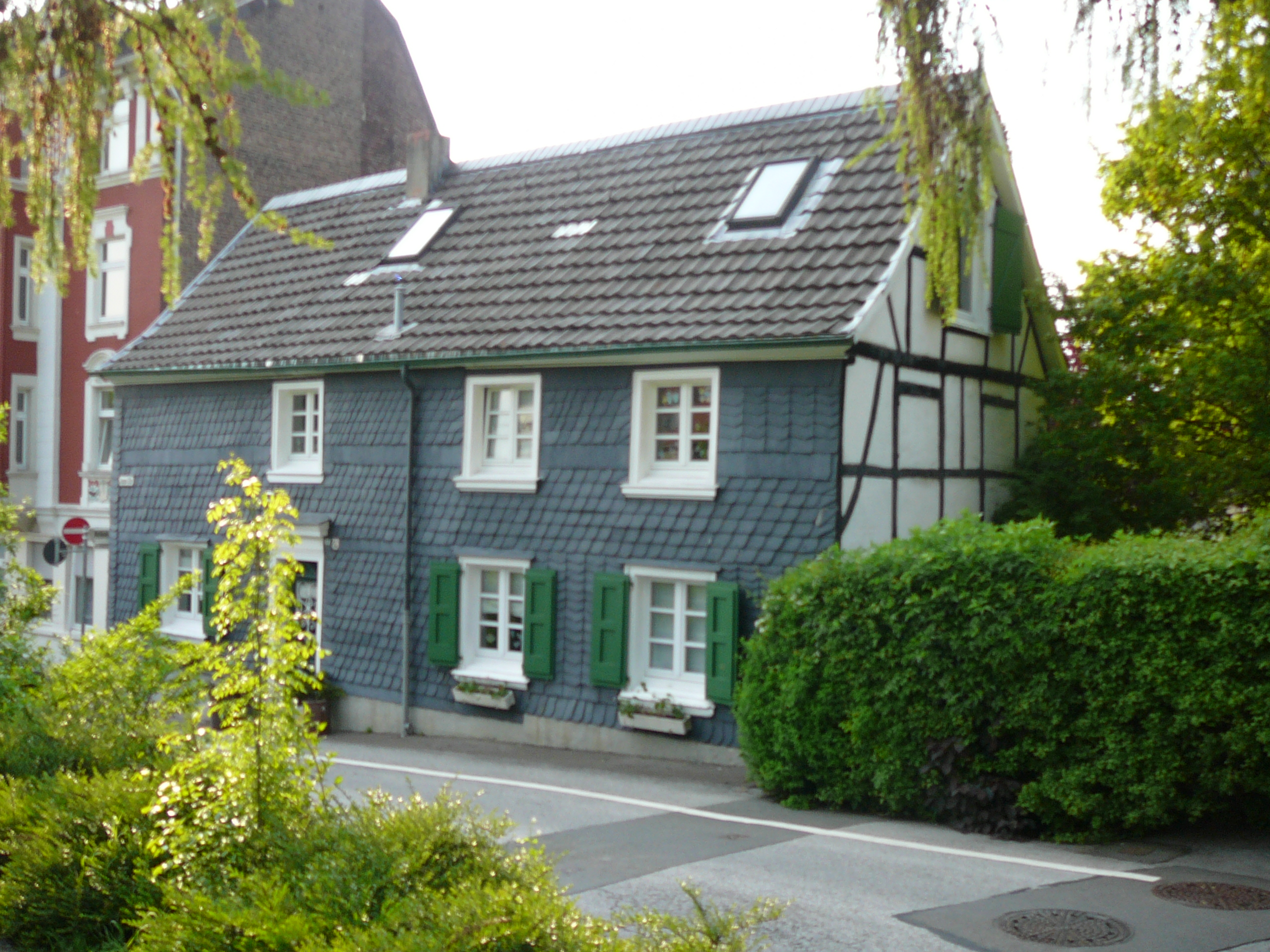 Inselstraße, Wuppertal